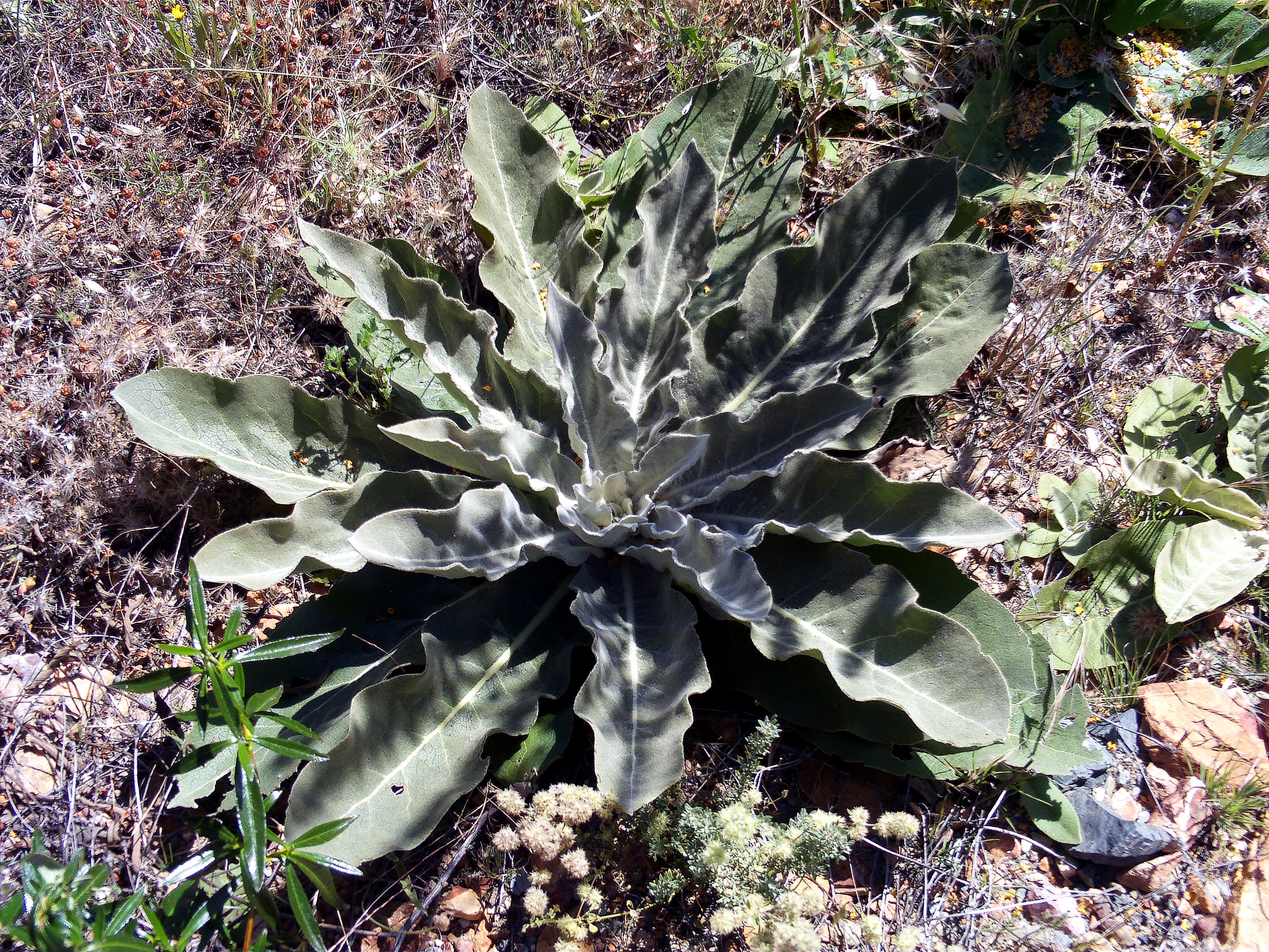 Verbascum pulverulentum Flowers Closeup Valle de Alcudia, Spain